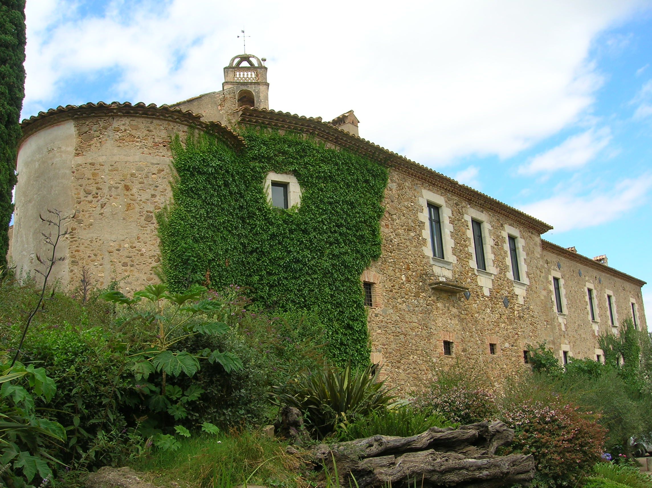 Castell d'Empordà - La Bisbal d'Empordà - Catalunya.JPG